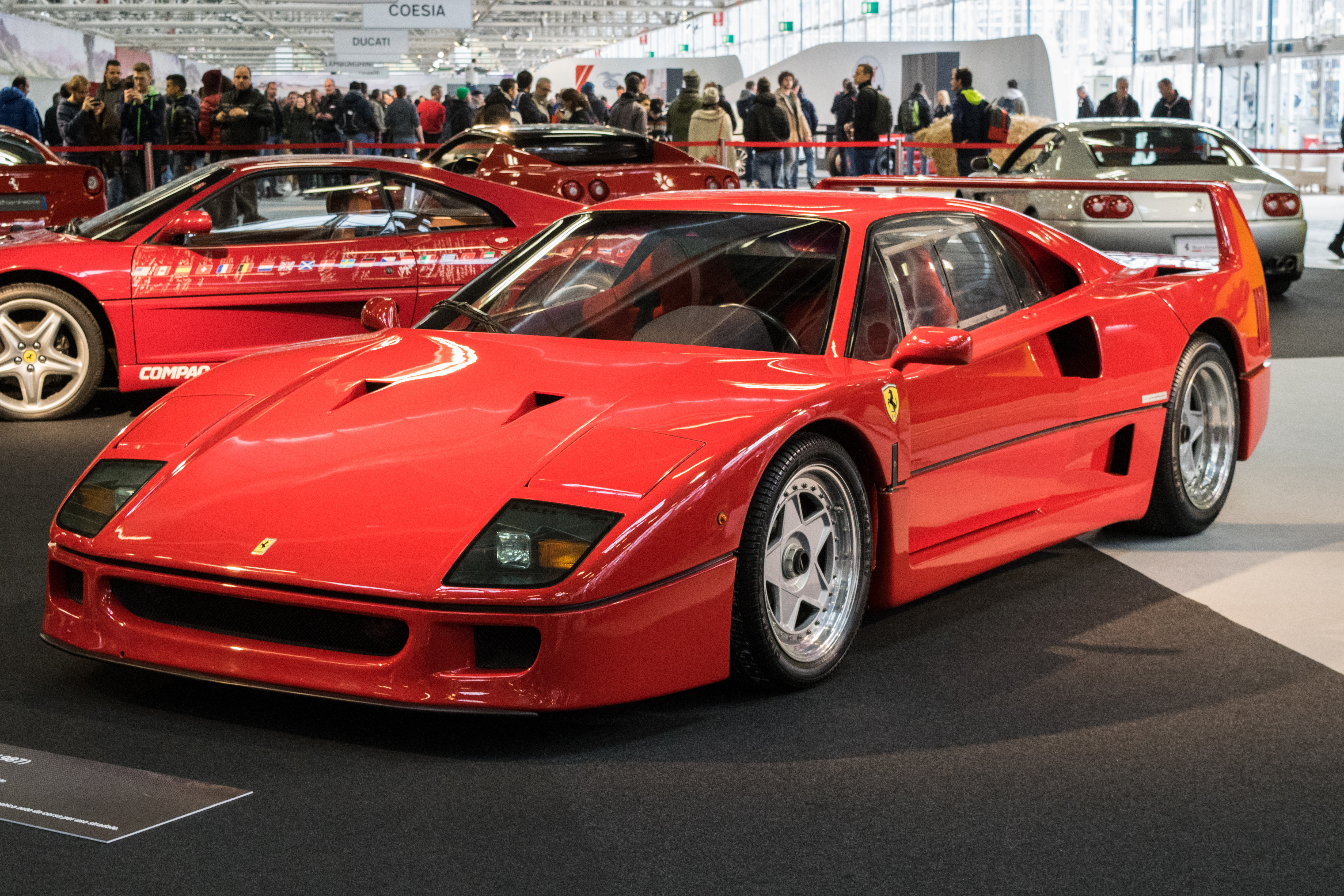 Ferrari F40